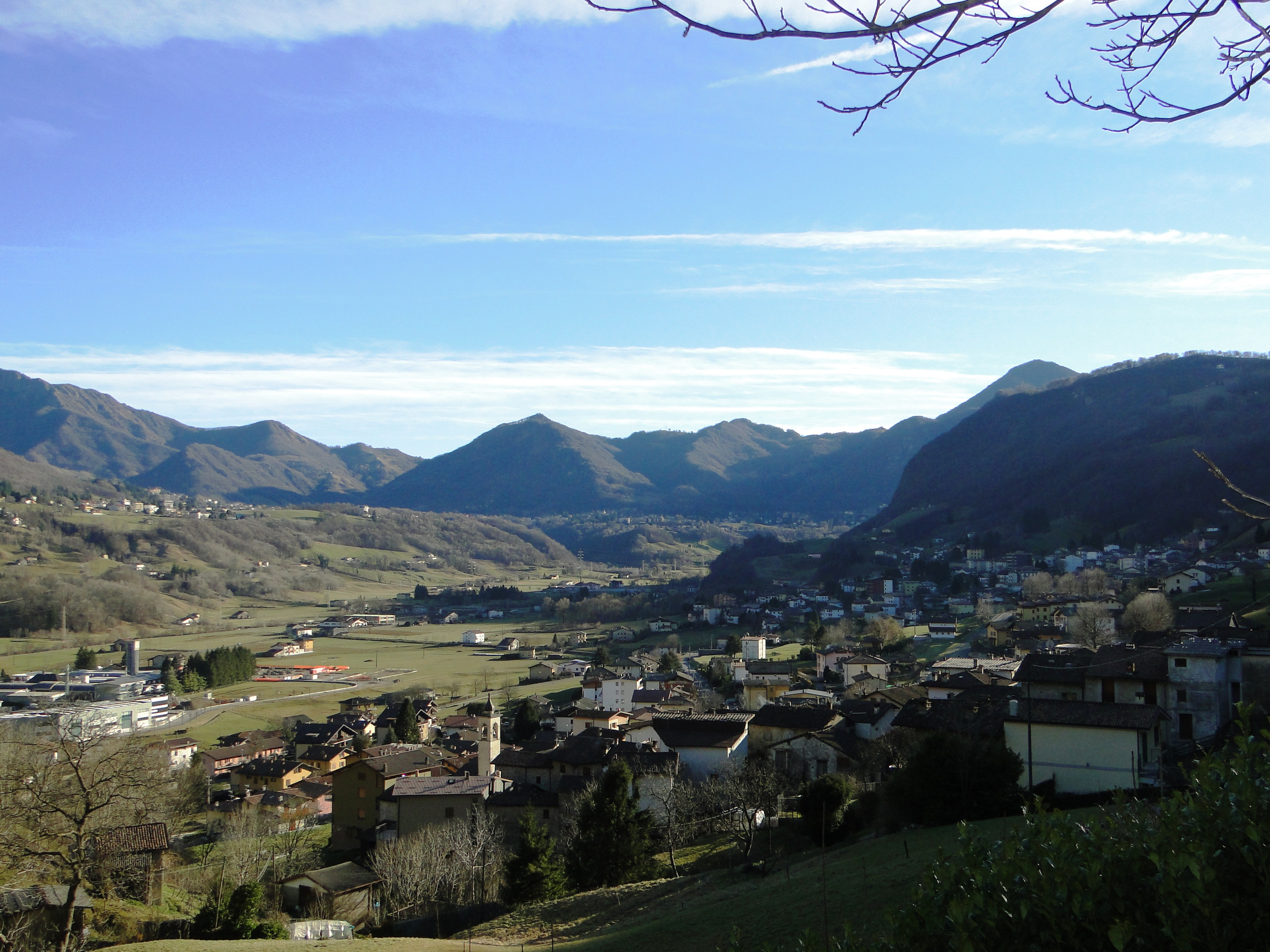 Baiedo, fraz. di Pasturo (LC). Italy